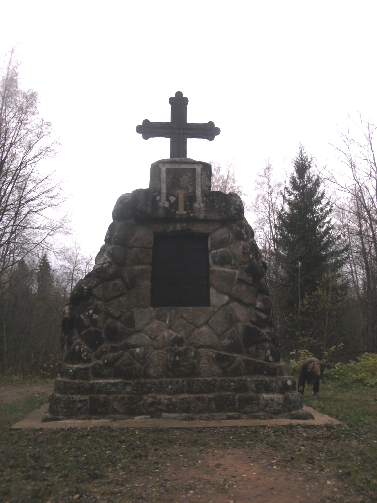 Тихвинская система, памятник Петру I на Невско-Волжском водоразделе